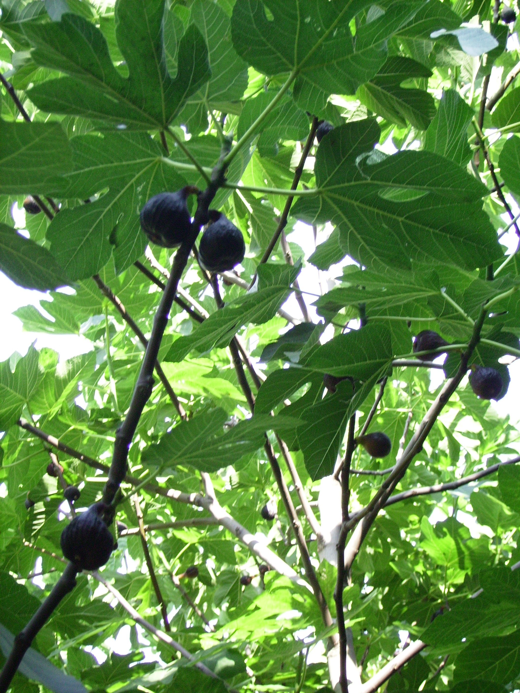 Brancam de figues a punt de madurar